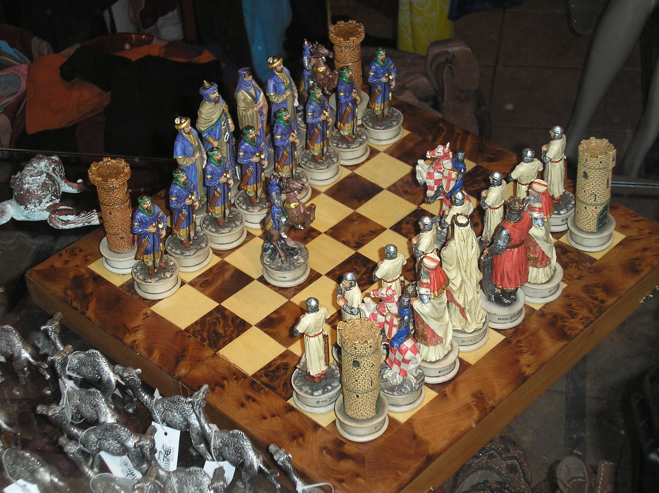 Ajedrez de Moros y cristianos (de una tienda del Albaicín, Granada).